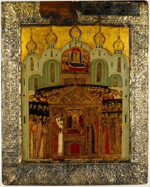 ПОЛОЖЕНИЕ РИЗЫ ГОСПОДНЕЙ Около 1627 года Москва Дерево; темпера; оклад – серебро, камка; басма, золочение, чернь 38 х 32 Происходит из Успенского собора Московского Кремля ММК